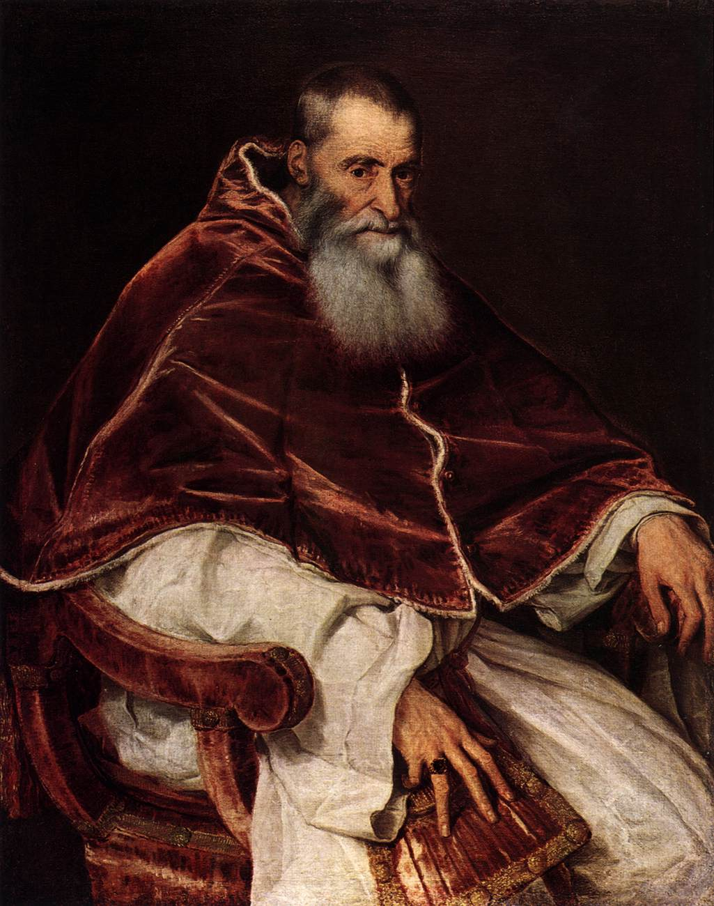 Ritratto di papa Paolo III a capo scoperto, (olio su tela, cm 113,7 x 88,8), Napoli, Museo di Capodimonte (inv. Q 130).